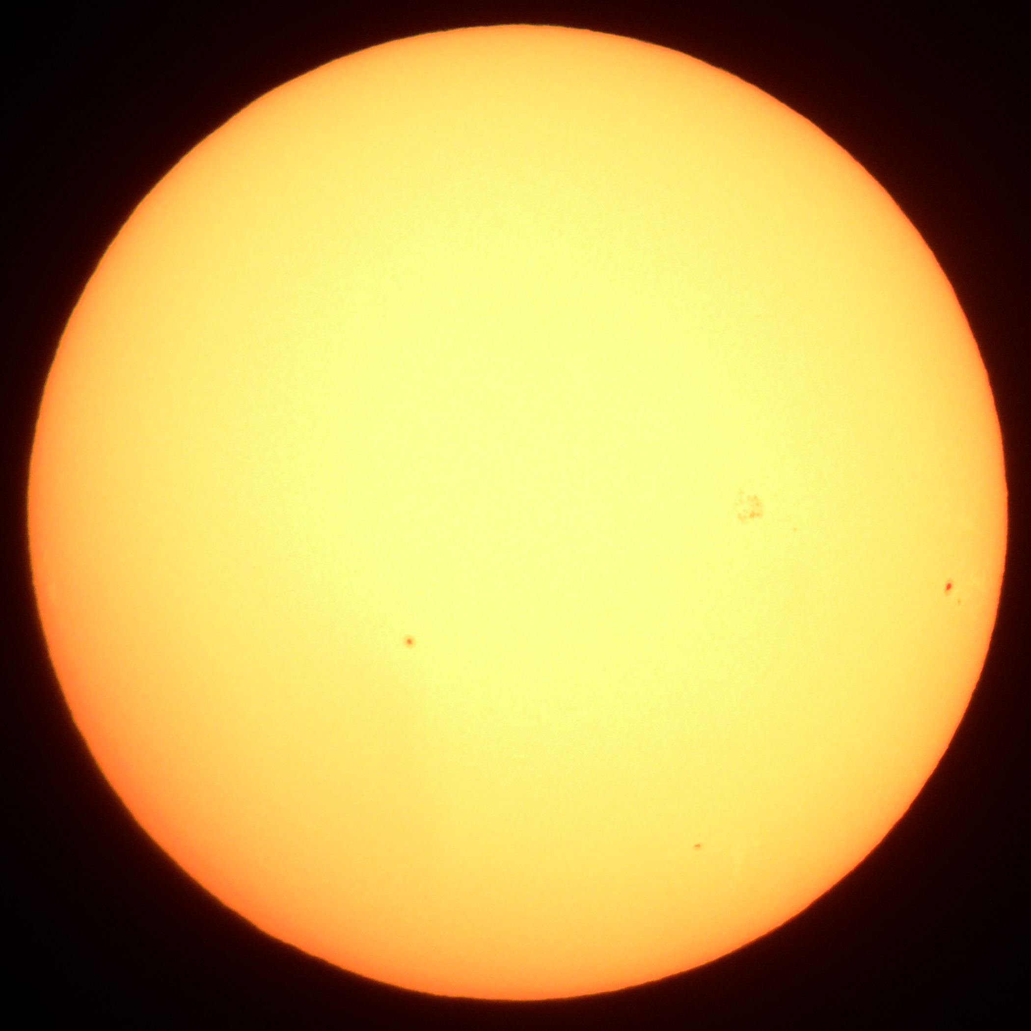 Le Soleil. Photo prise avec un Canon Powershot S100 en afocal derrière un télescope (avec filtre solaire) équipé d'un oculaire.